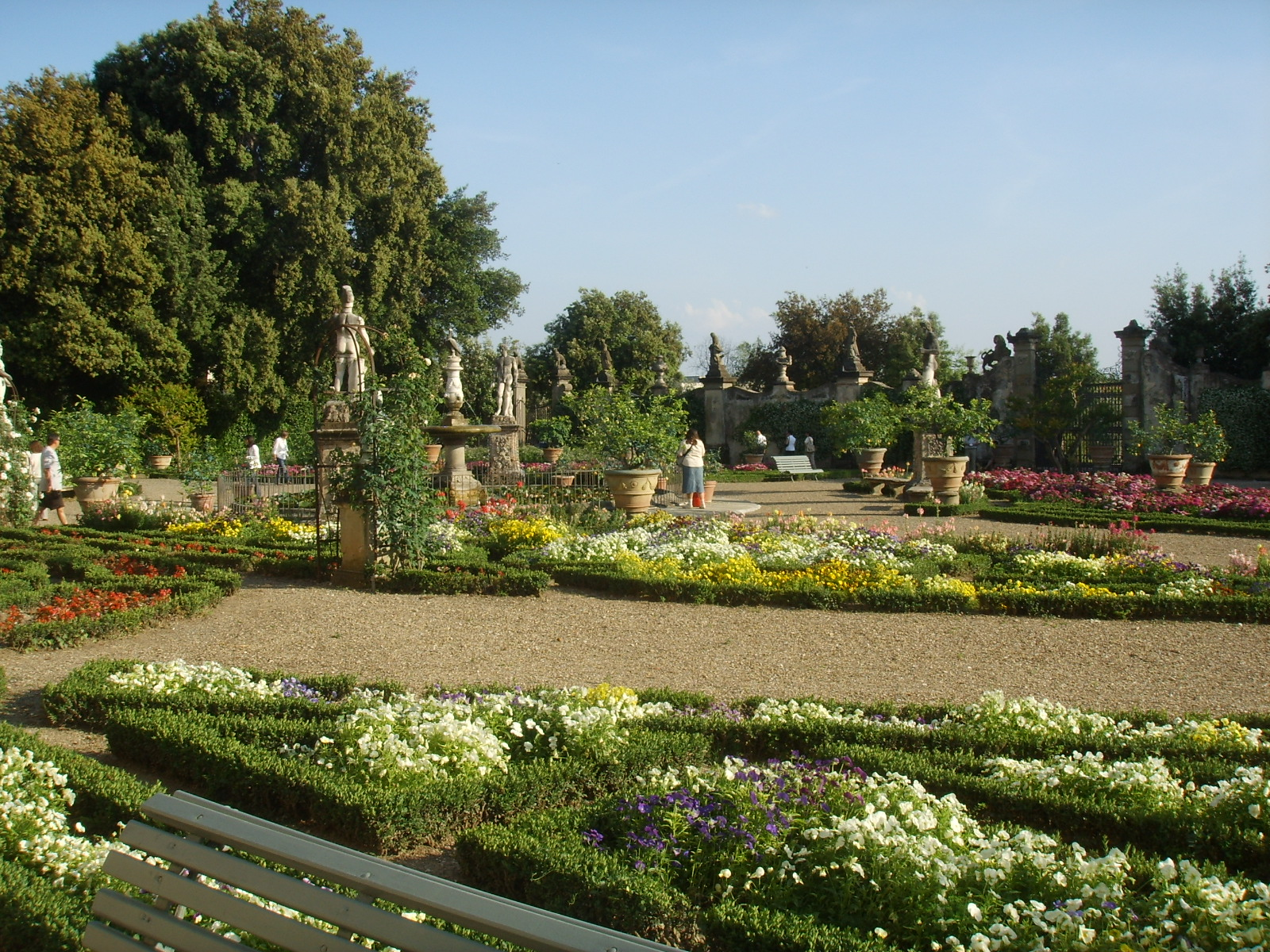 Villa guicciardini corsi salviati, giardino